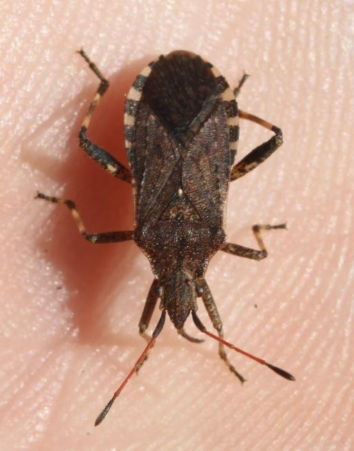 Ceraleptus gracilicornis am 20. April 2018 in der Schwetzinger Hardt